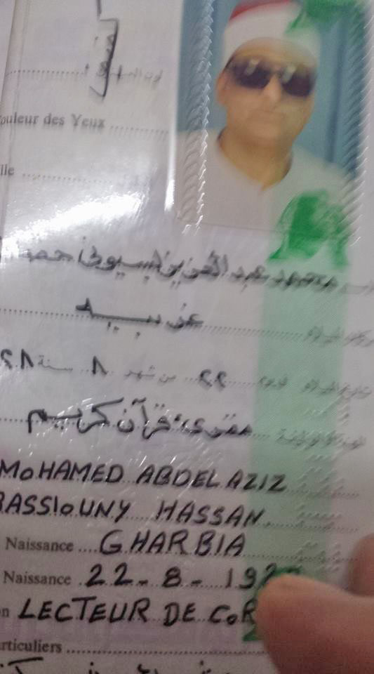 صورة لجواز سفر الشيخ محمد عبدالعزيز حصان بها تاريخ الميلاد